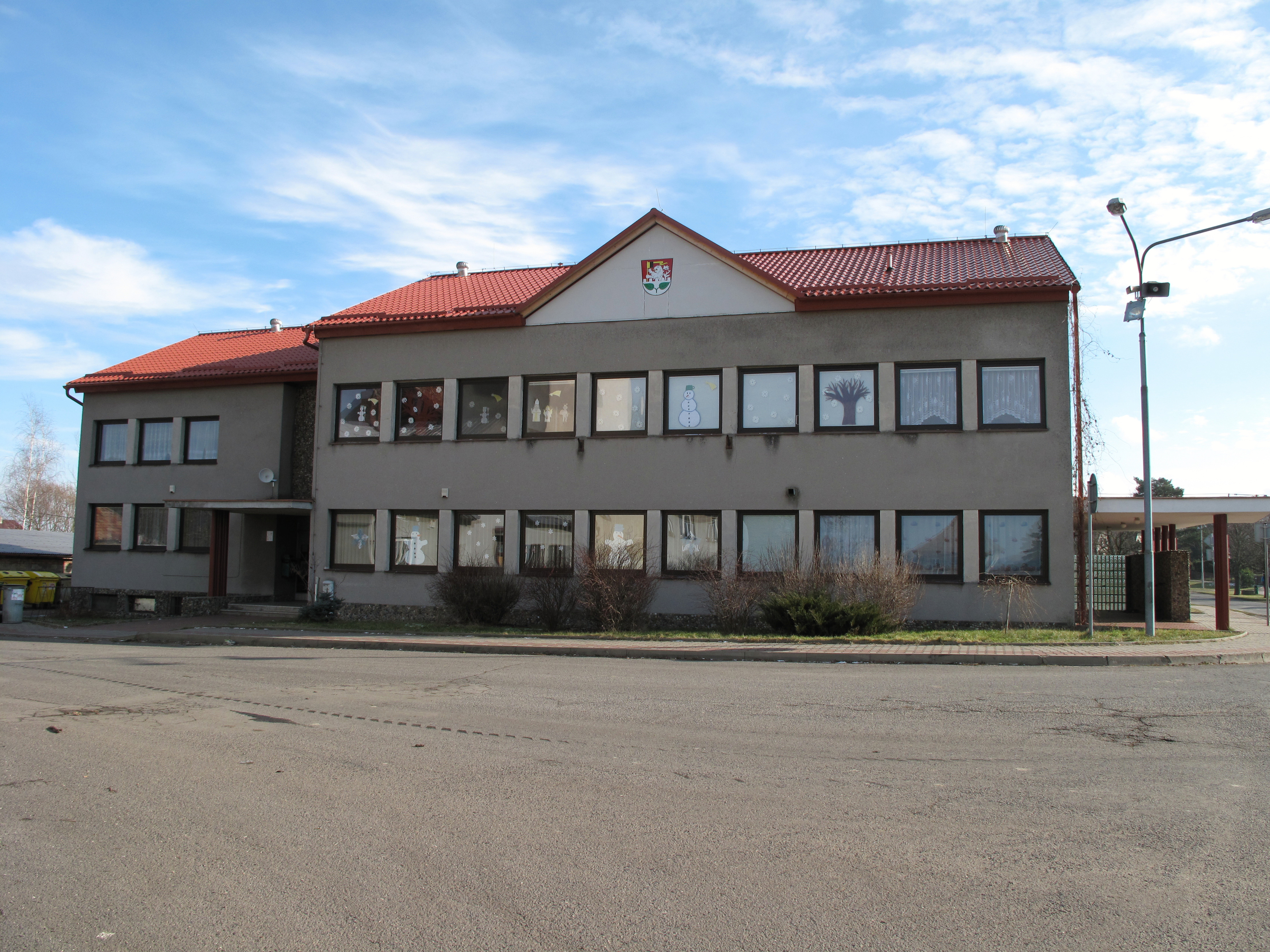 Školka v Březně. Okres Mladá Boleslav, Česká republika.